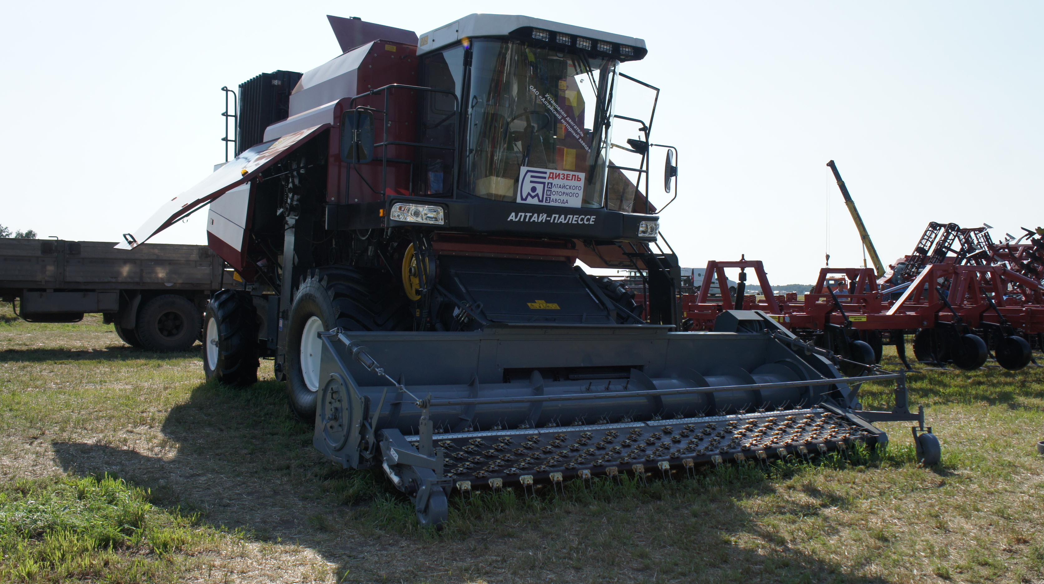 Комбайн "Палессе" производства "Гомсельмаш" с двигателем Алтайского моторного завода. Выставка "Сибирский агропарк", июль 2015 г.